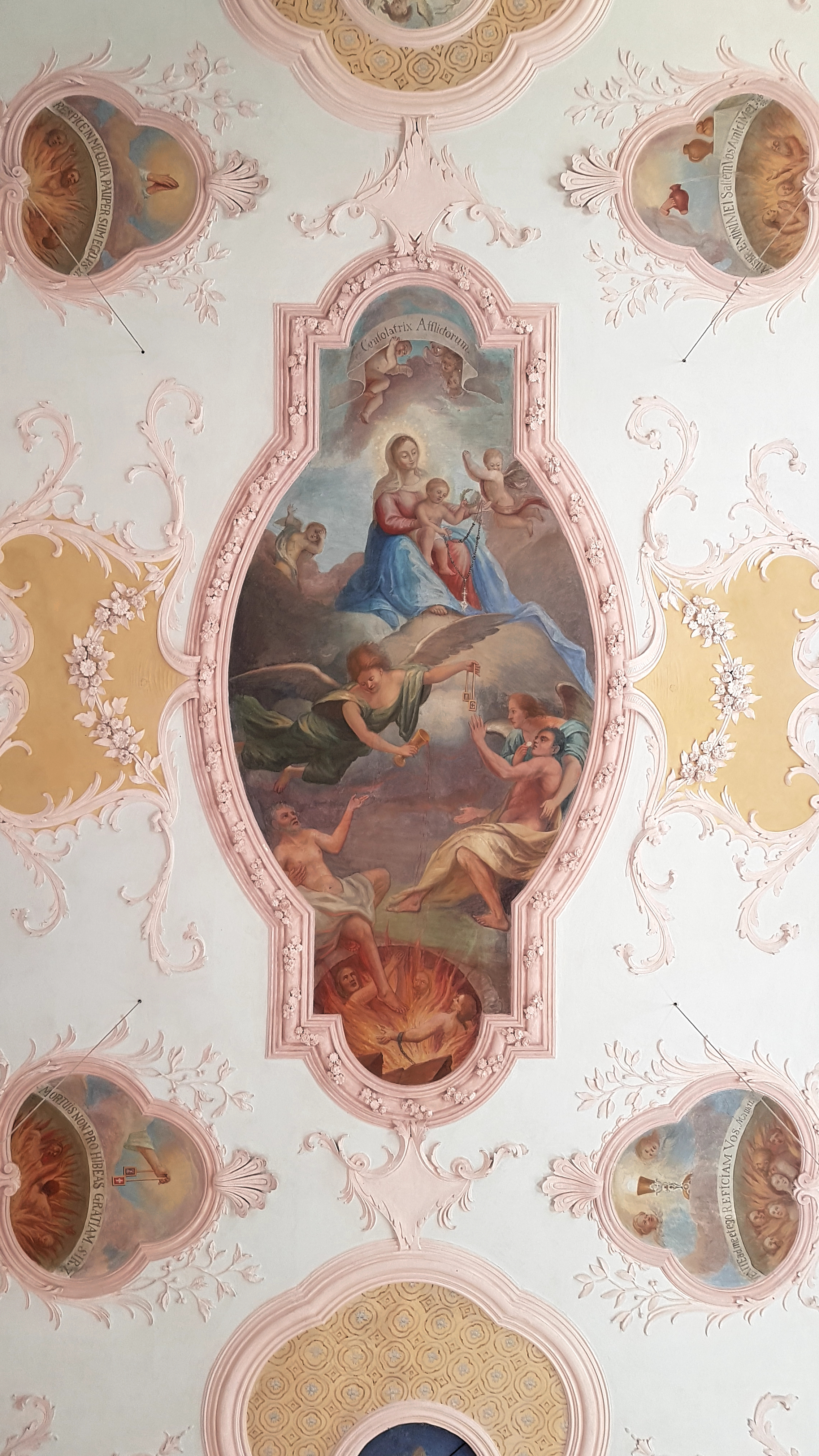 St. Laurentius (Unterbrunn), neubarocke Deckenfresken im Langhaus.